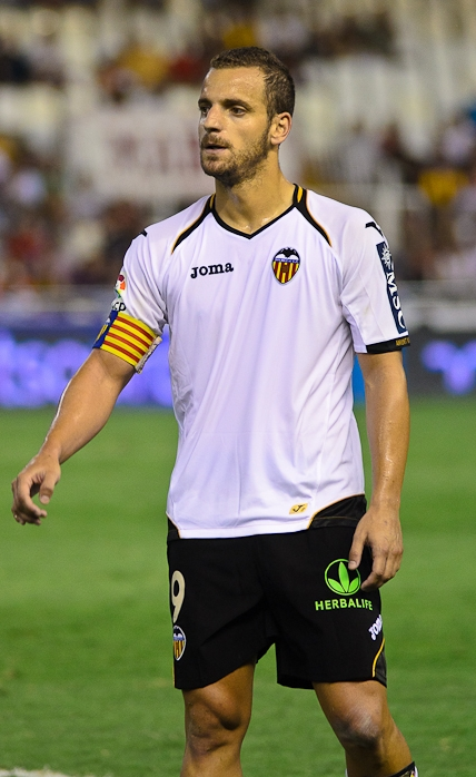 El capità merengot Roberto Soldado